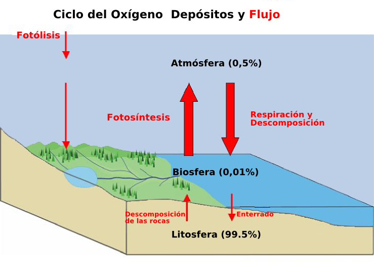 Oxygen cycle